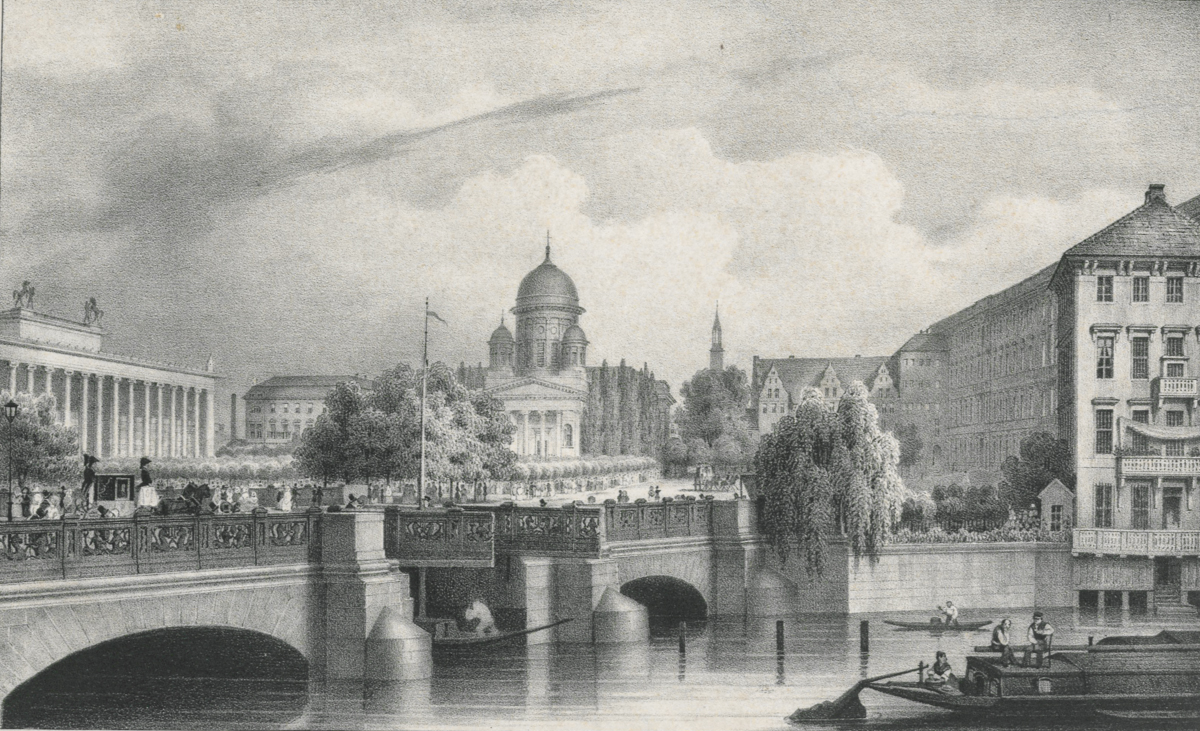 Druckgraphik aus der Sammlung der Stiftung Stadtmuseum Berlin Künstler: Wilhelm Loeillot Titel: "Die Schloss Brücke"